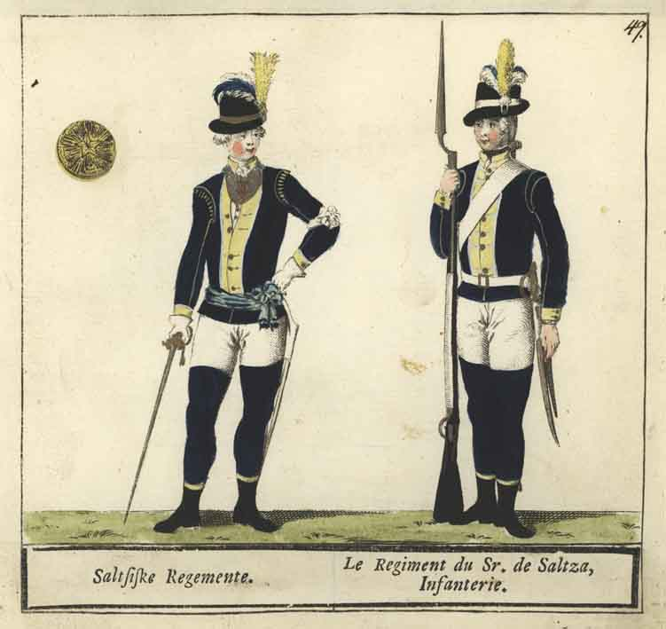 Garnisonsregementets i Göteborg uniform m/1779, ur C. G. Roos samling.